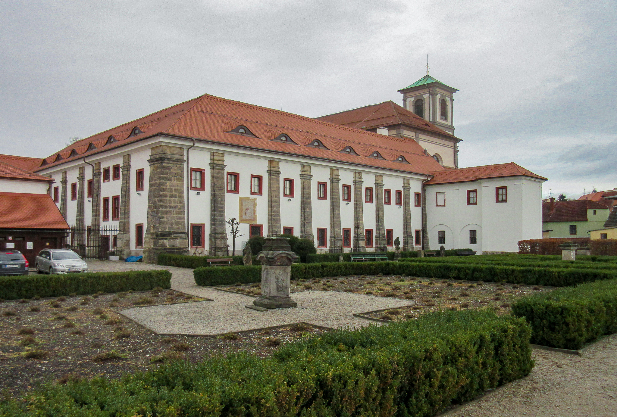 Muzeum od zahrady po opravách